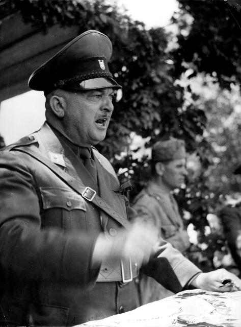 Мирко Пук, министар правосуђа НДХ, држи говор у Крижевцима, 6. јул 1941.